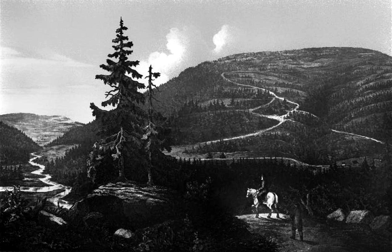 Гора Ботогол (2300 м.) c месторождением графита, 1847.